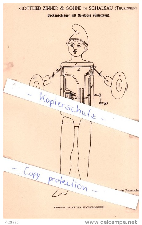 Am 15. April 1886 bei Kaiserlichen Patentamt patentiertes Blechspielzeug in Form einer Puppe als „Beckenschläger mit Spieldose (Spielzeug)“ ...